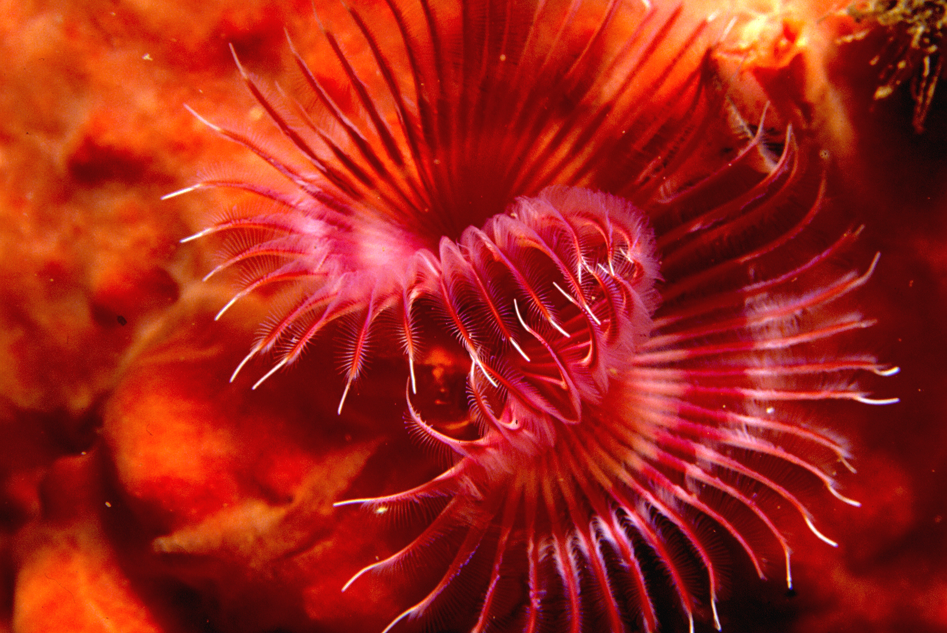 La photo montre bien la forme en "fer à cheval" du panache